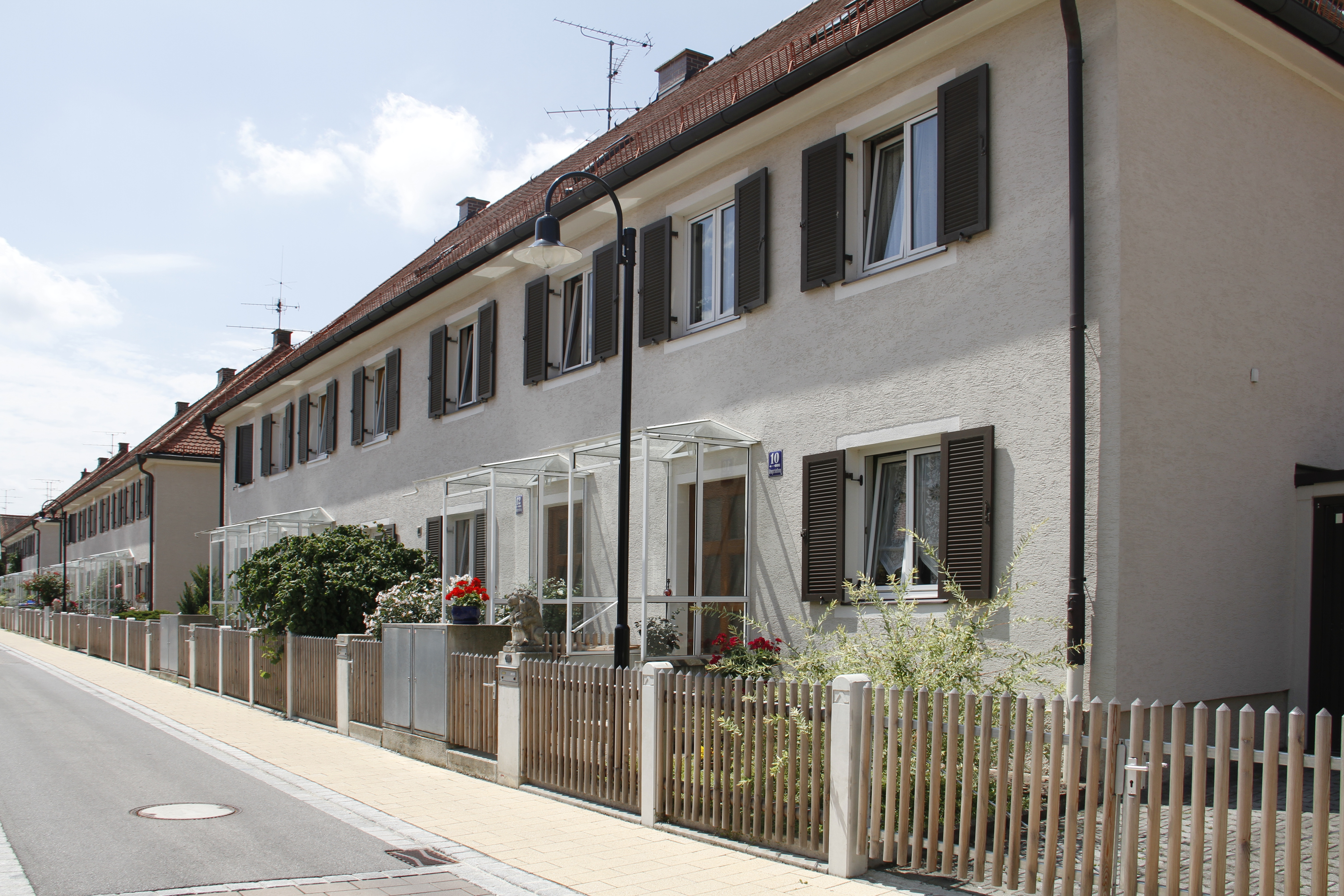 Kriegersiedlung München, Vierfamilienhaus des ersten Bauabschnitts.